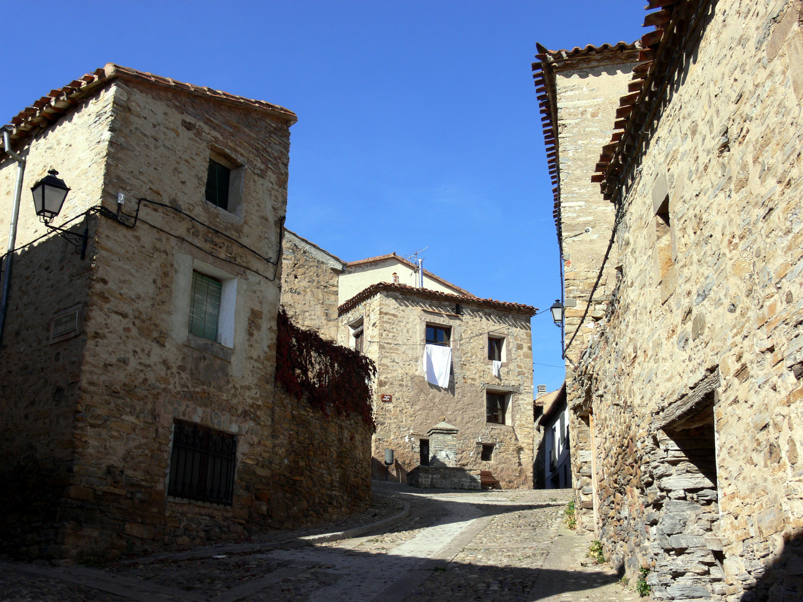 Yanguas, Soria - España